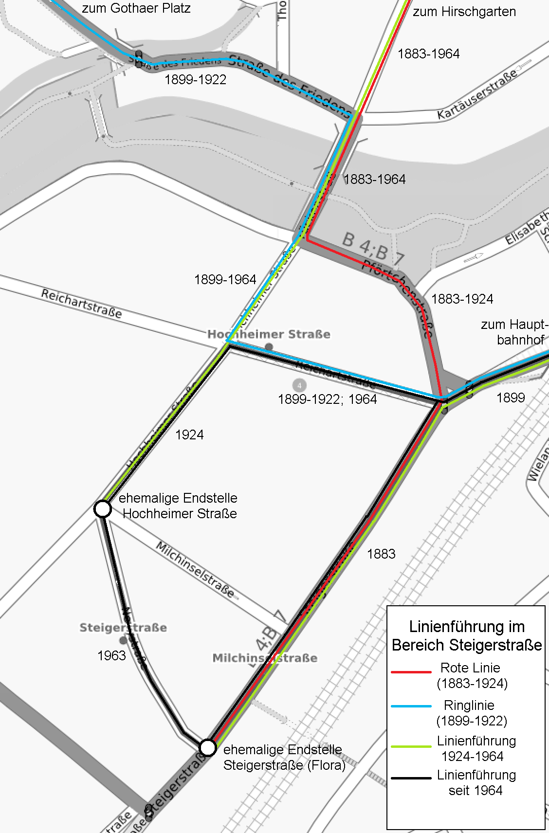 Der Plan zeigt einen Ausschnitt des Erfurter Stadtbahnnetzes, rund um die Steigerstraße/Hochheimer Straße im Südwesten der Stadt. Näheres dazu in der Legende im Plan.